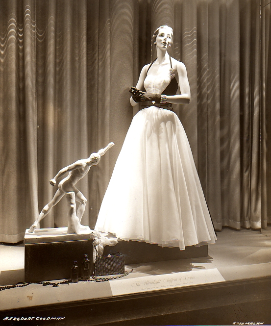 Robe Mousseline pour Bergdorf Goodman NY